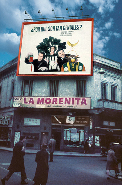 La "fotoperformance" ¿Por qué son tan geniales?: póster panel vía pública instalado por los artistas Edgardo Giménez, Dalila Puzzovio y Carlos Squirru en la esquina de Florida y Viamonte, ciudad de Buenos Aires.